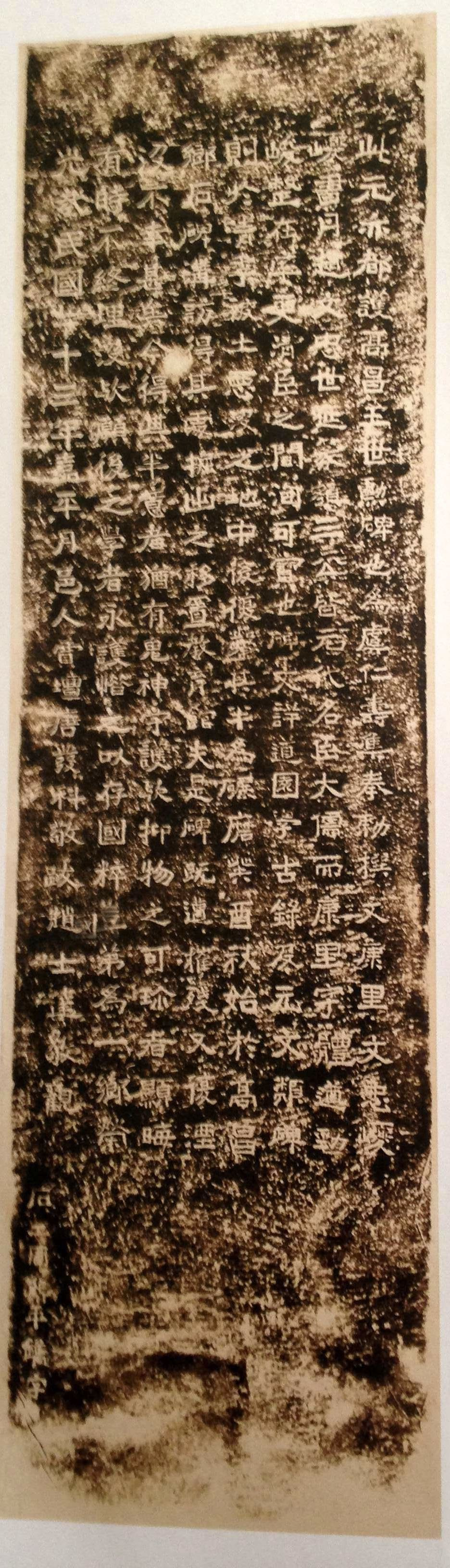 元文宗至顺二年（1331年），由虞集撰文，巎巎书丹，赵世延篆额的亦都护高昌王世勋残碑（部分）